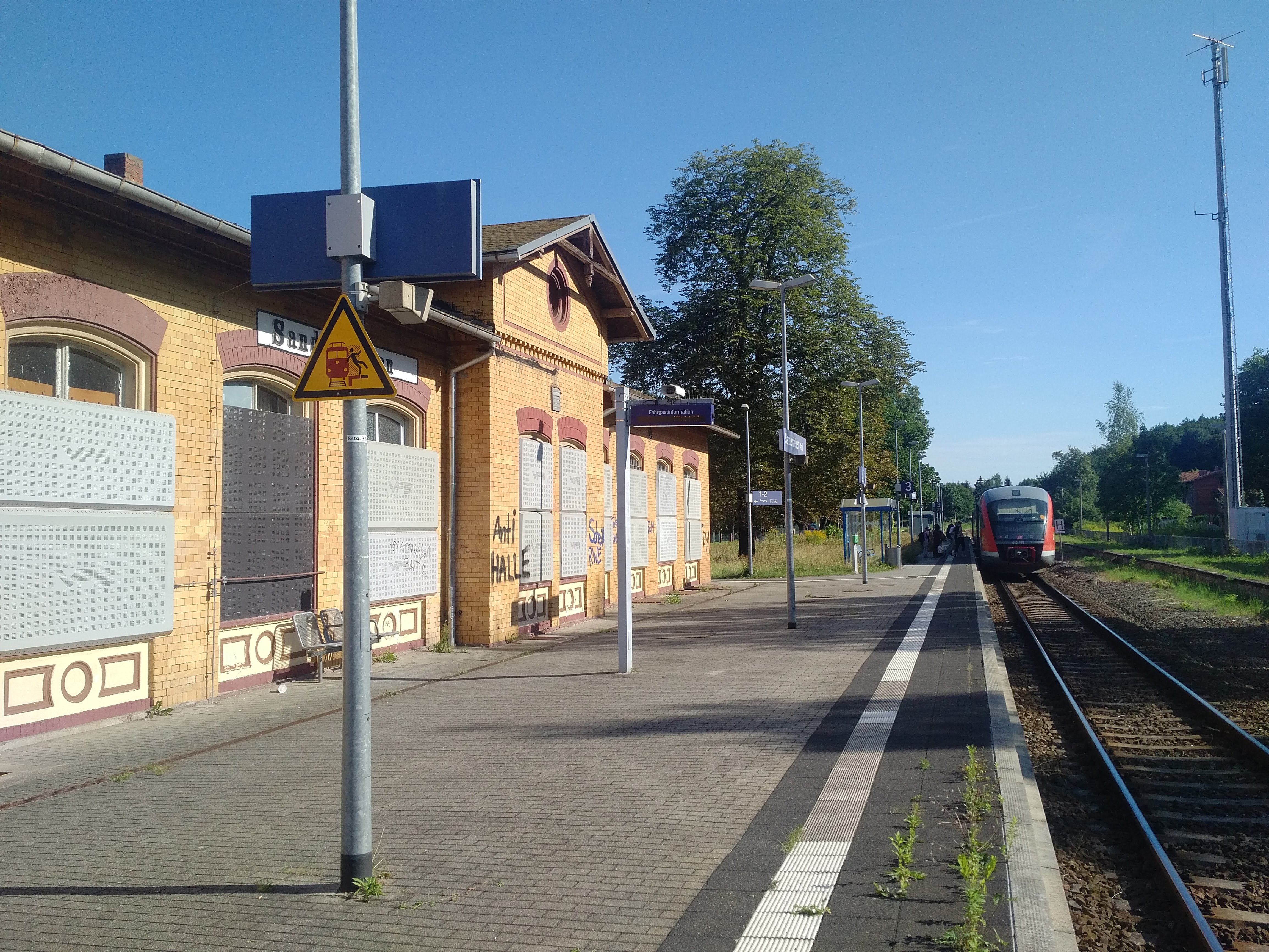 Bahngleis auf der Bahnstrecke Berlin-Blankenheim